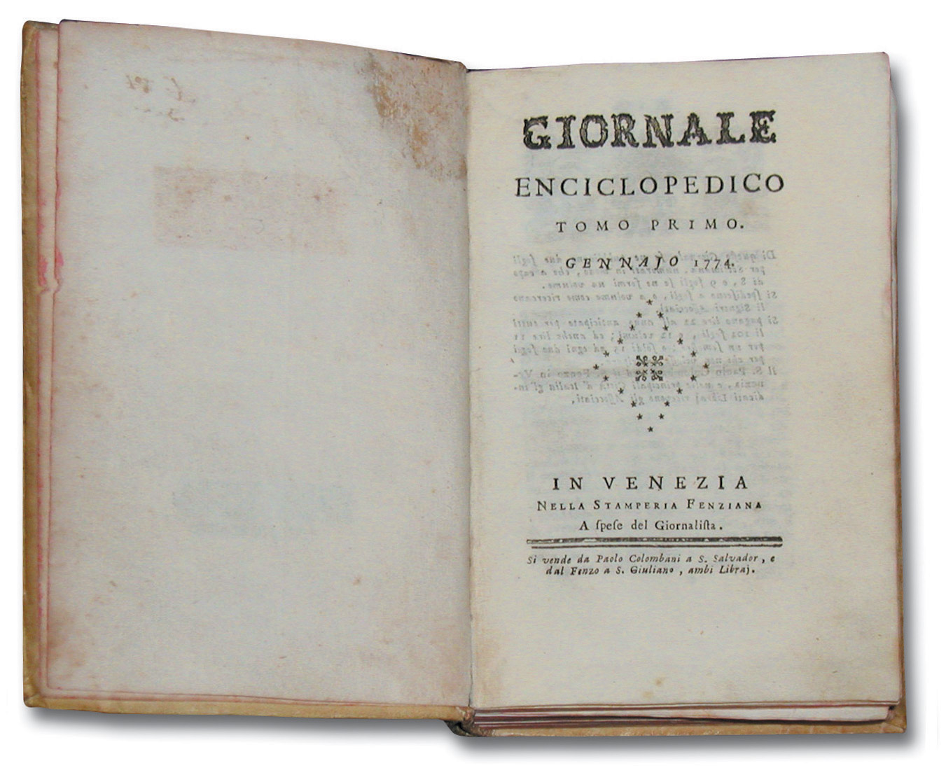 Giornale Enciclopedico edito da Elisabetta Caminer Turra (Venezia, 1751 - Orgiano, 1796), Stamperia fenziana, Venezia, frontespizzio